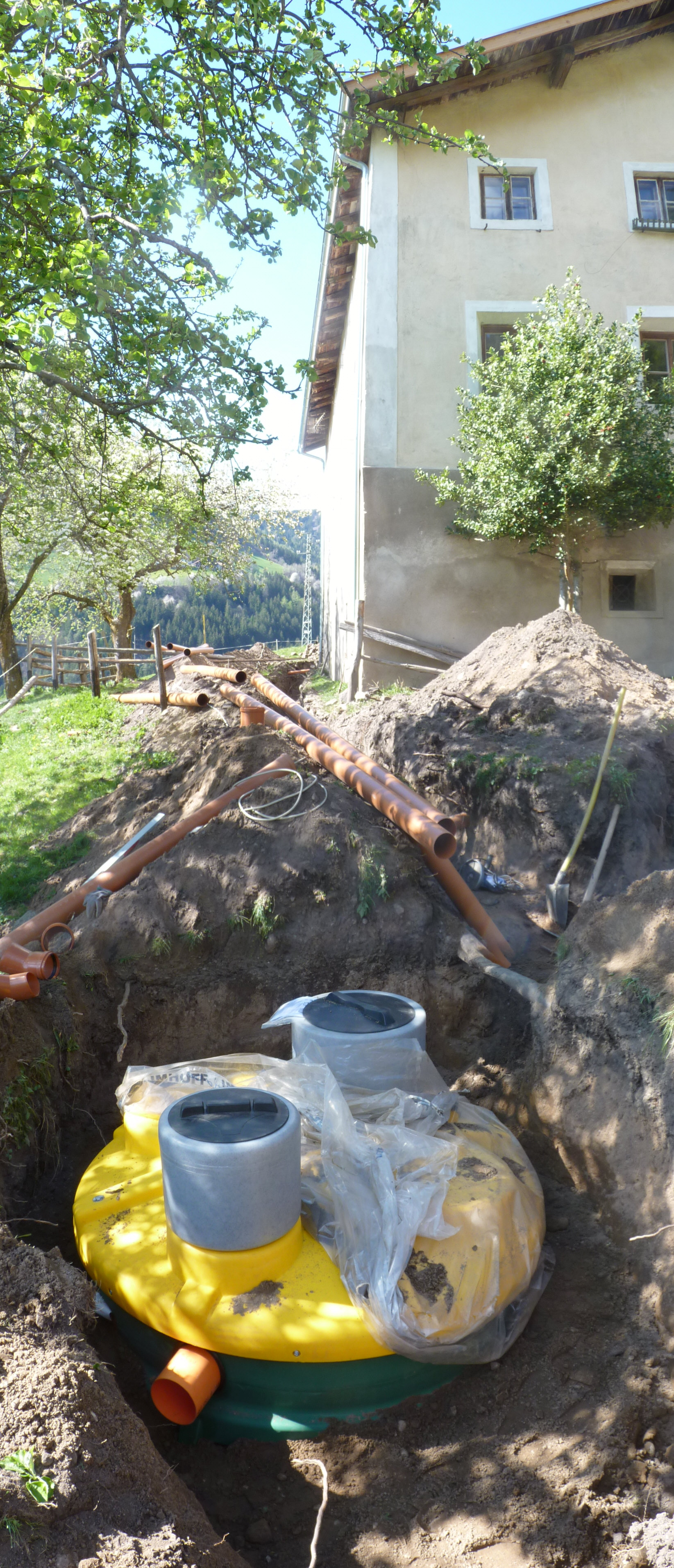 Eine vorgefertigte Imhoff-Sickergrube für ein Bauernhaus in Südtirol, bereits versenkt